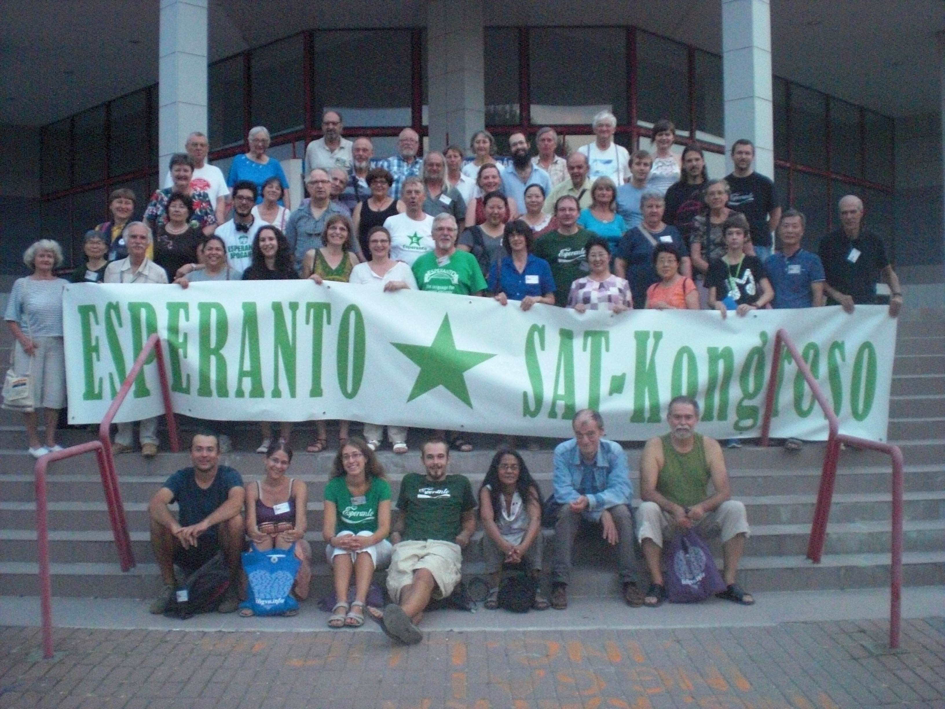 88-a SAT-Kongreso 2015